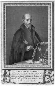 Ukranian